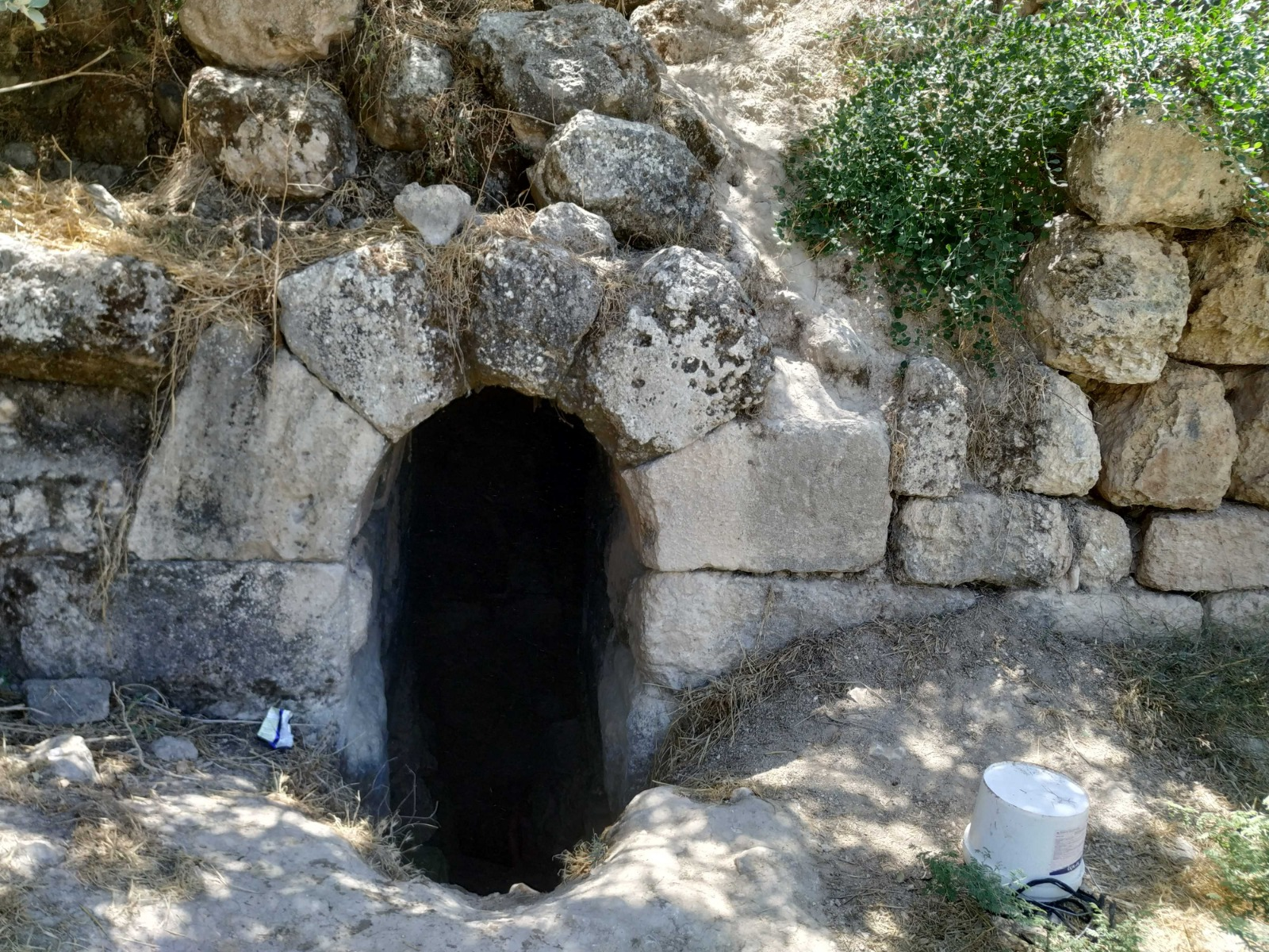 בור מים בתוך חורבה